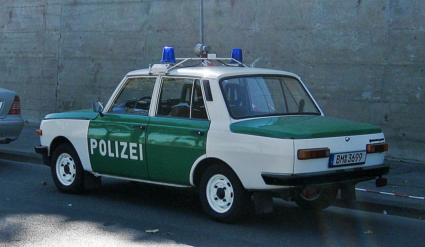 Ausser Dienst gestellte alte Fahrzeuge der nordrhein-westfälischen Polizei; fotografiert am Vorabend einer Fahrzeugschau anlaesslich des Deutschlandtages 2011